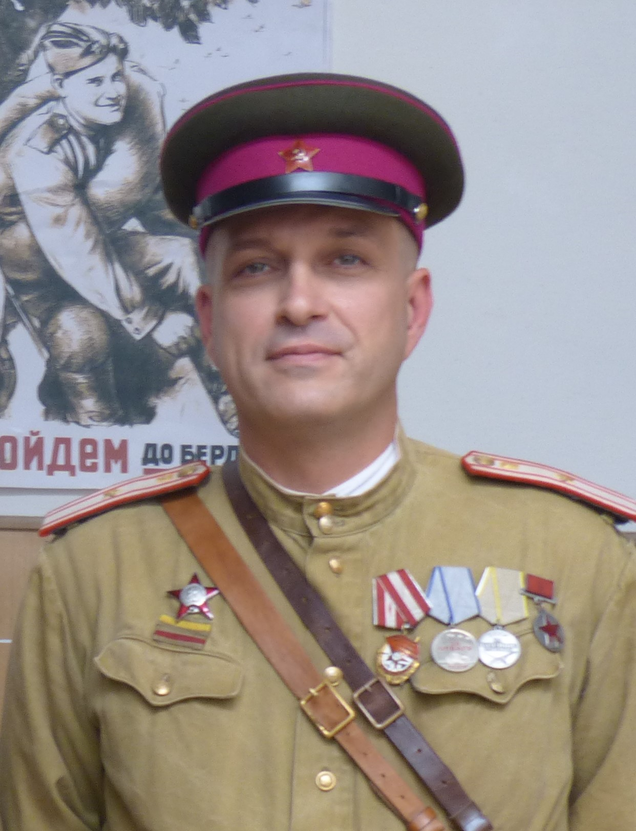 Евгений Воловенко во время съемок "По законам военного времени-4" в Черняховске